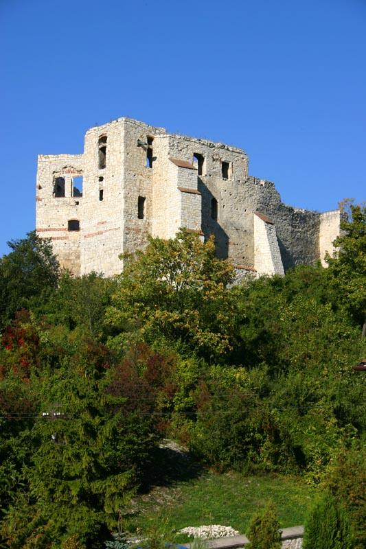 Kazimierz Dolny in Poland